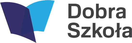 "Dobra szkoła" – logo reformy edukacji w Polsce z 2017 r.